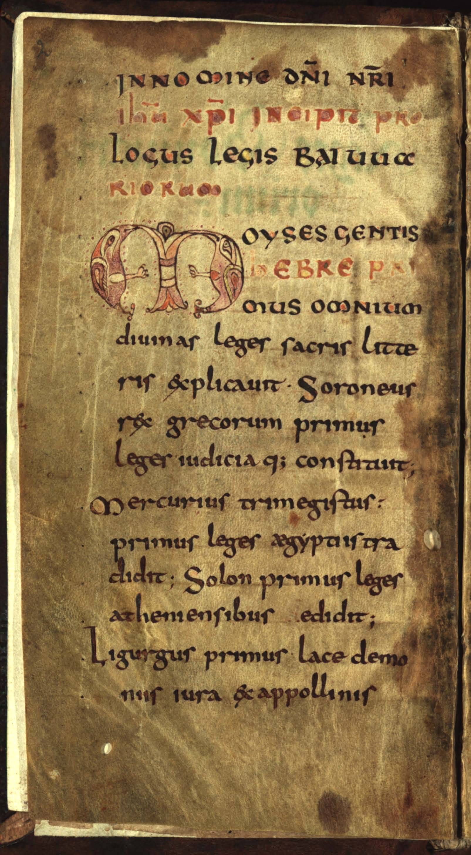 Prolog der Lex Baiuvariorum, Ingolstädter Handschrift der UB München Cim. 7